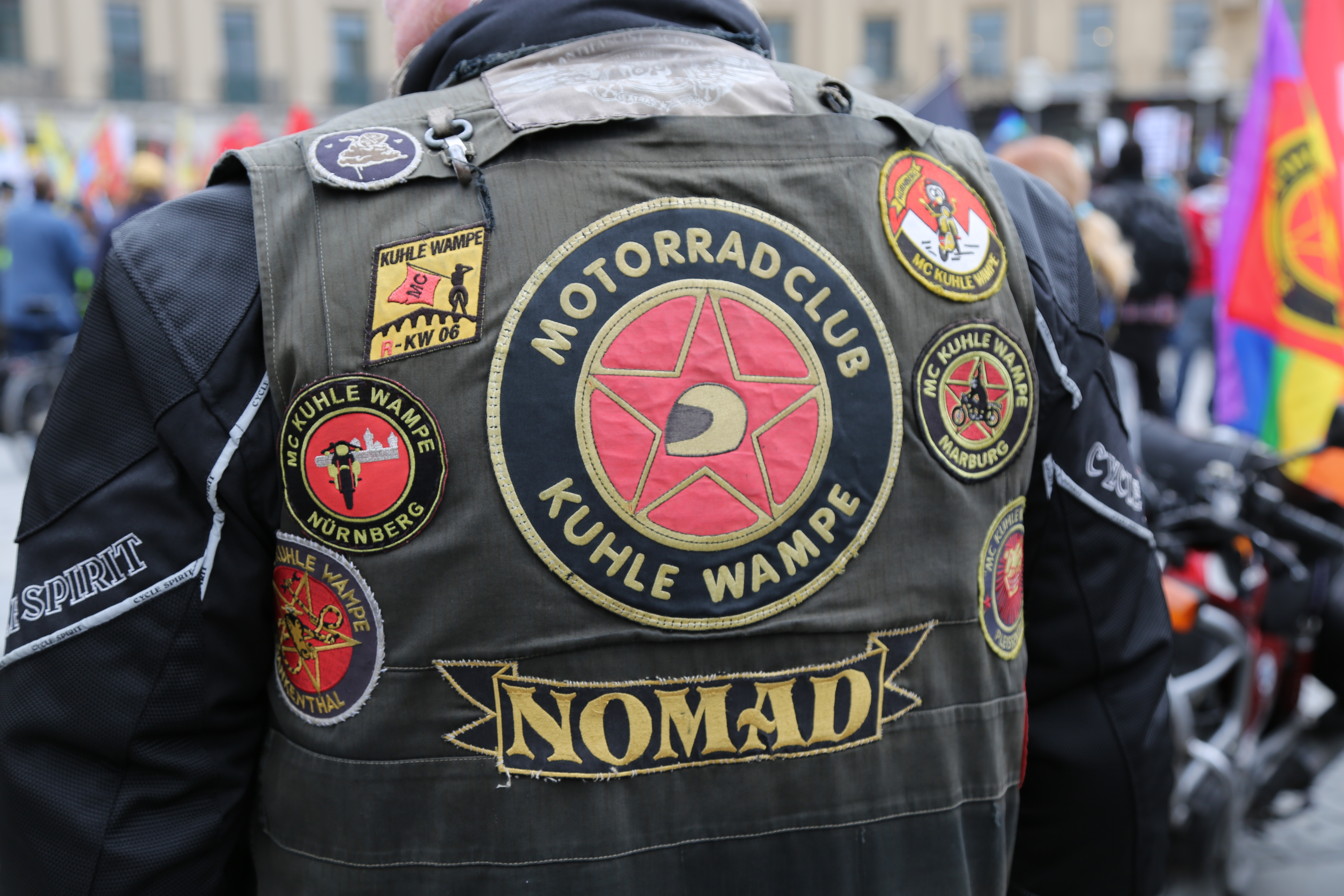 Kutte des MC Kuhle Wampe am Rand der Demonstration gegen die Sicherheitskonferenz in München am 18. Februar 2017